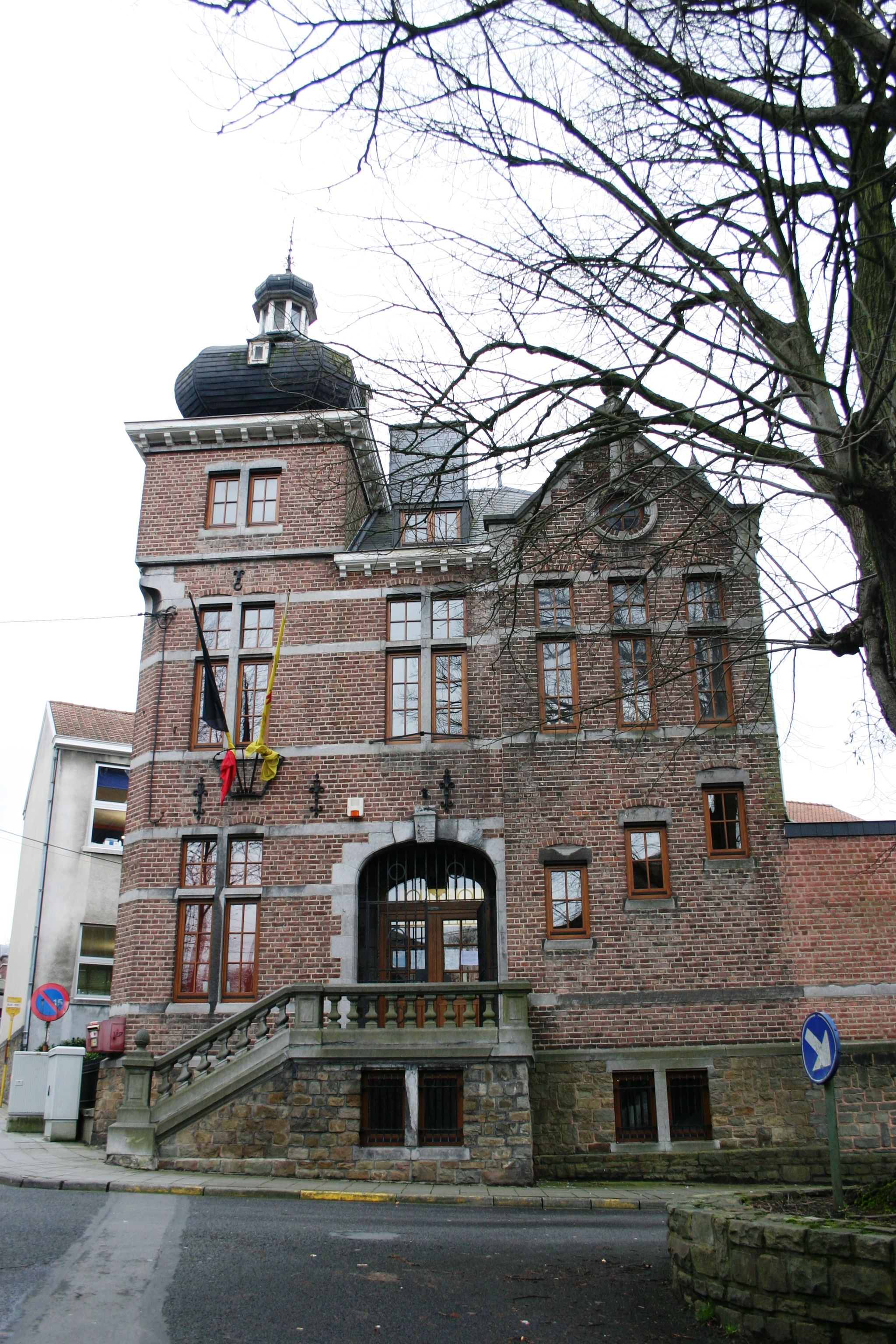 Fréier Märei zu Retinne.